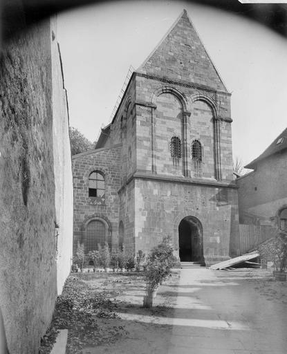 église ND de Galilée_Ensemble cathédrale_ Saint-Dié-des-Vosges_France